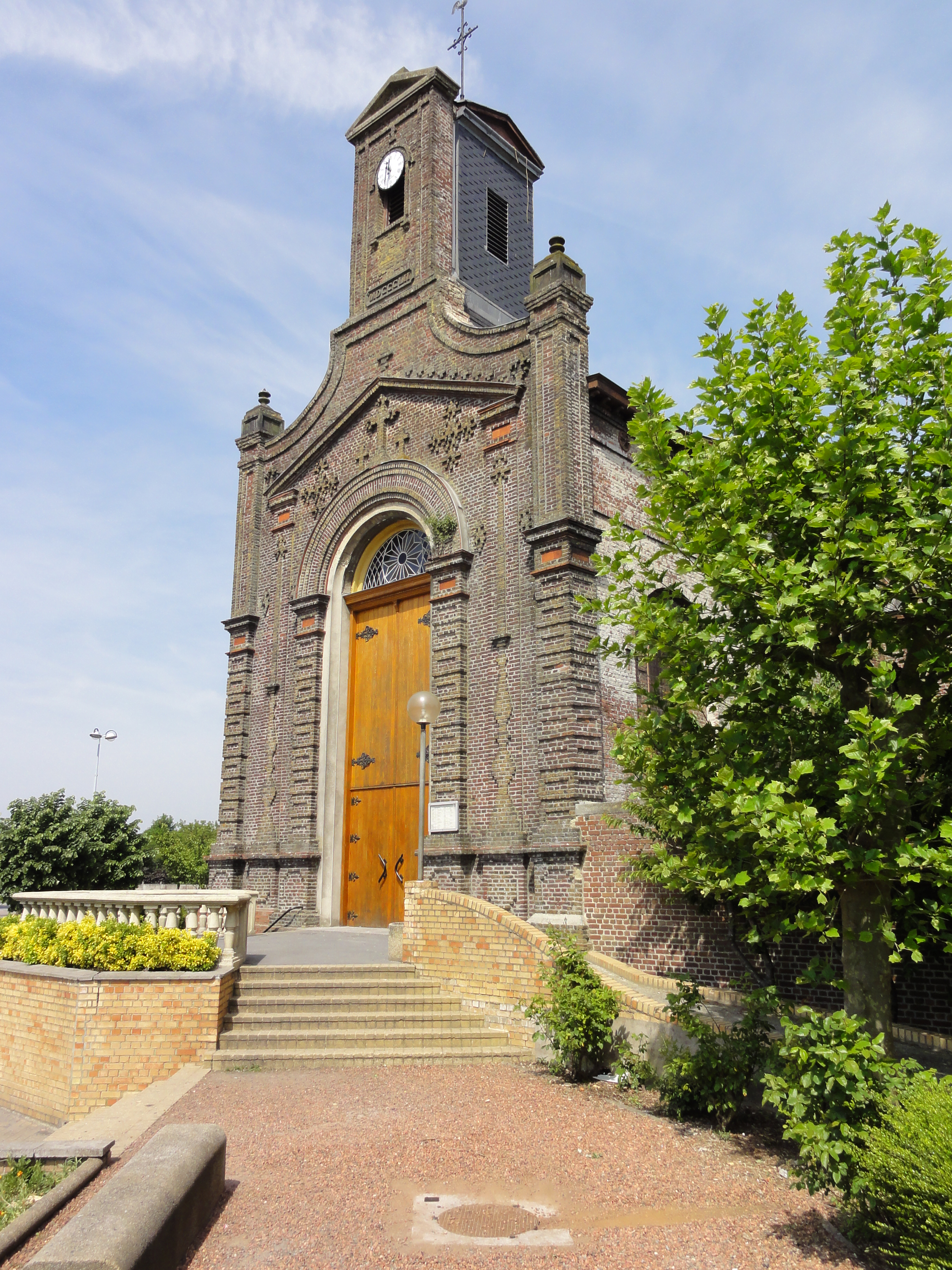 La Fosse La Sentinelle de la Compagnie des mines d'Anzin était un charbonnage constitué d'un seul puits situé à La Sentinelle, Nord, Nord-Pas-de-Calais, France.